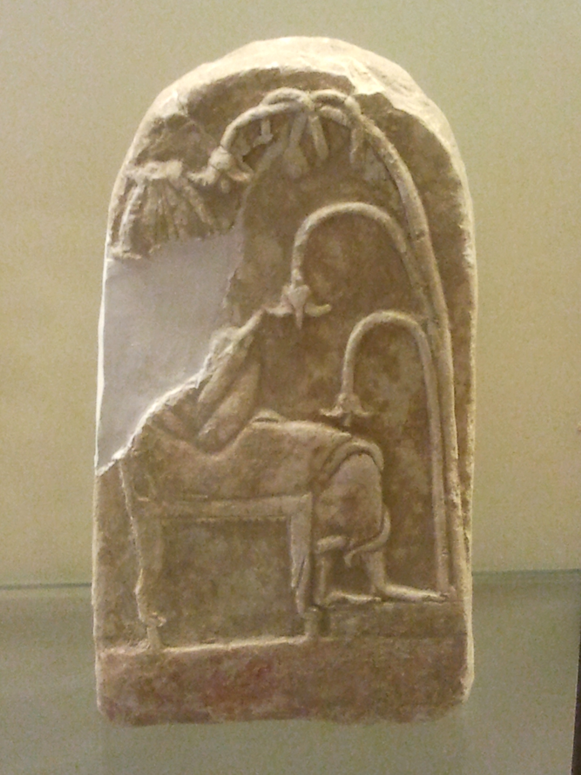 מוזיאון הכט חיפה, אסטלה מתל בית מירסים בחבל לכיש, דמות אל יושב על כסא מלכות מברך עץ מקודש